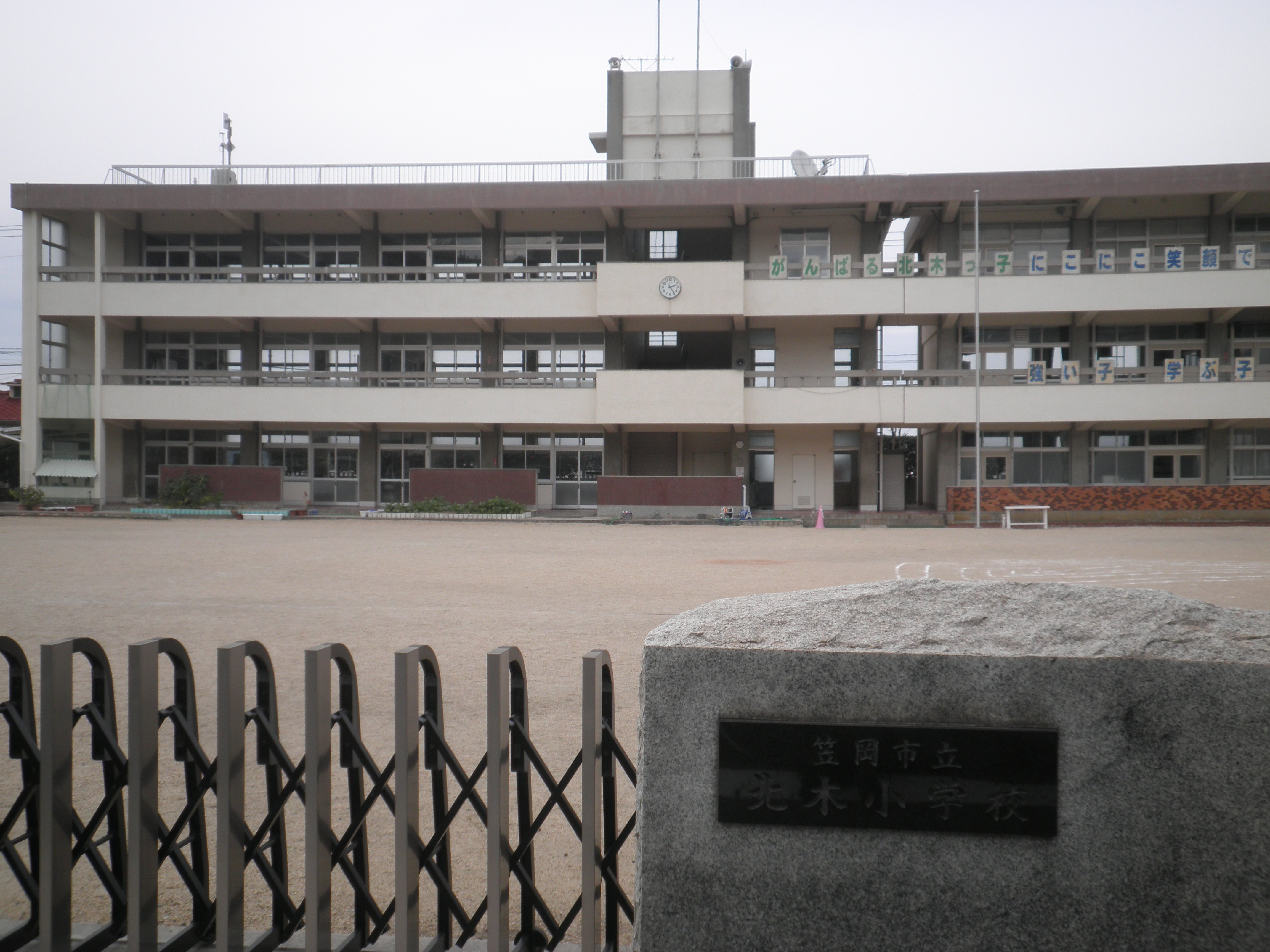 笠岡諸島の北木島の金風呂集落にある北木小学校